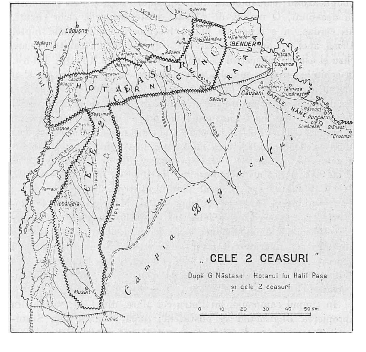 Fişierul conţine harta Bugeacului, a "celor două ceasuri" şi "satelor hăneşti" în secolele XVI-XVII. Cu linie punctată este trasat aşa numitul Hotar a lui Halil Paşa. Harta este extrasă din lucrarea Istoria Românilor a lui Constantin C Giurescu, publicată în 1944 Fişierul poate fi folosit fără restricţii